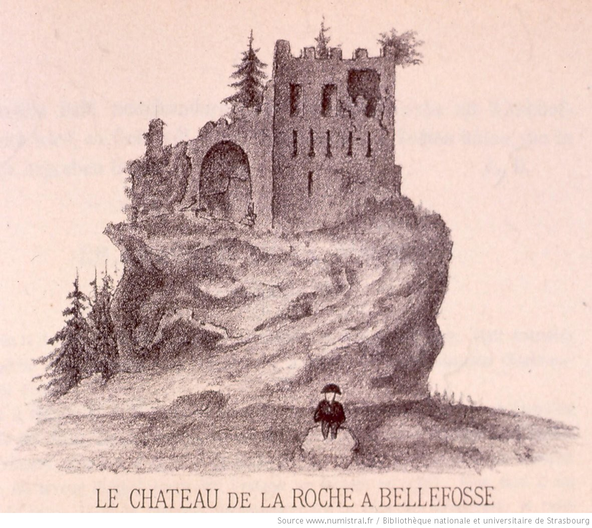 Le Château de La Roche à Bellefosse (1785) Oberlin, Philippe Henri.